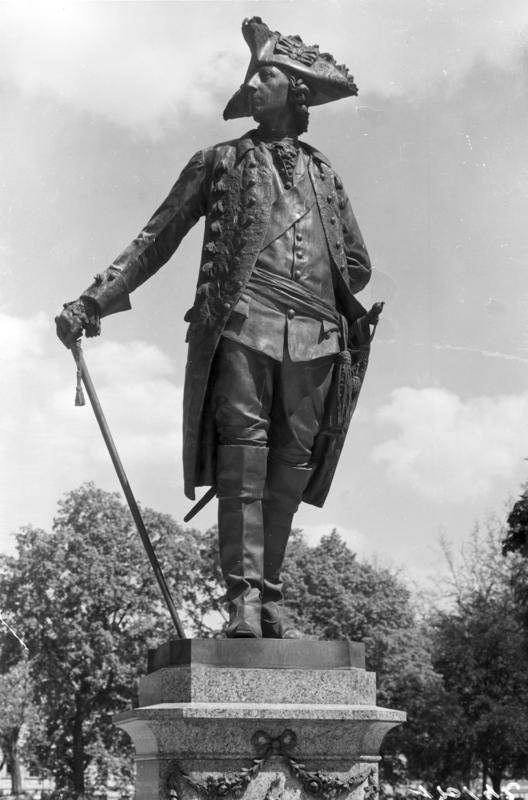 Title